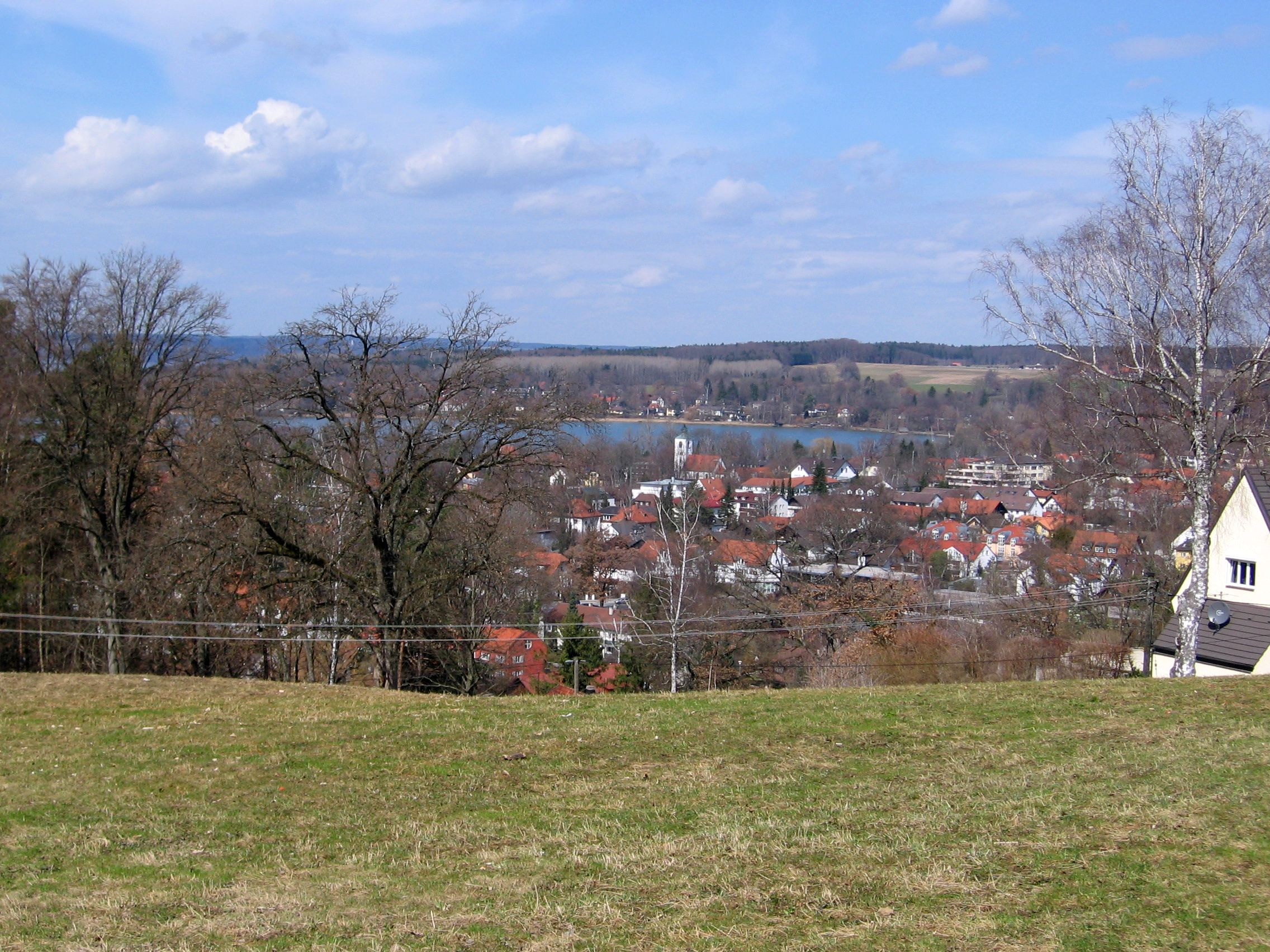 Zusehen ist die Stadt Herrsching am Ammersee